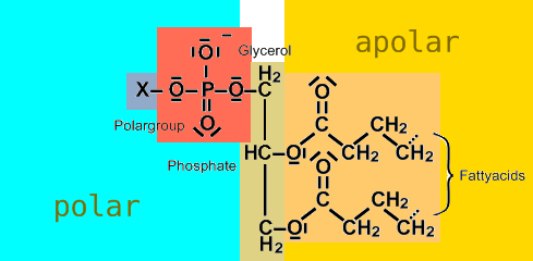 Stellt die Amphiphilie von Phospholipiden dar